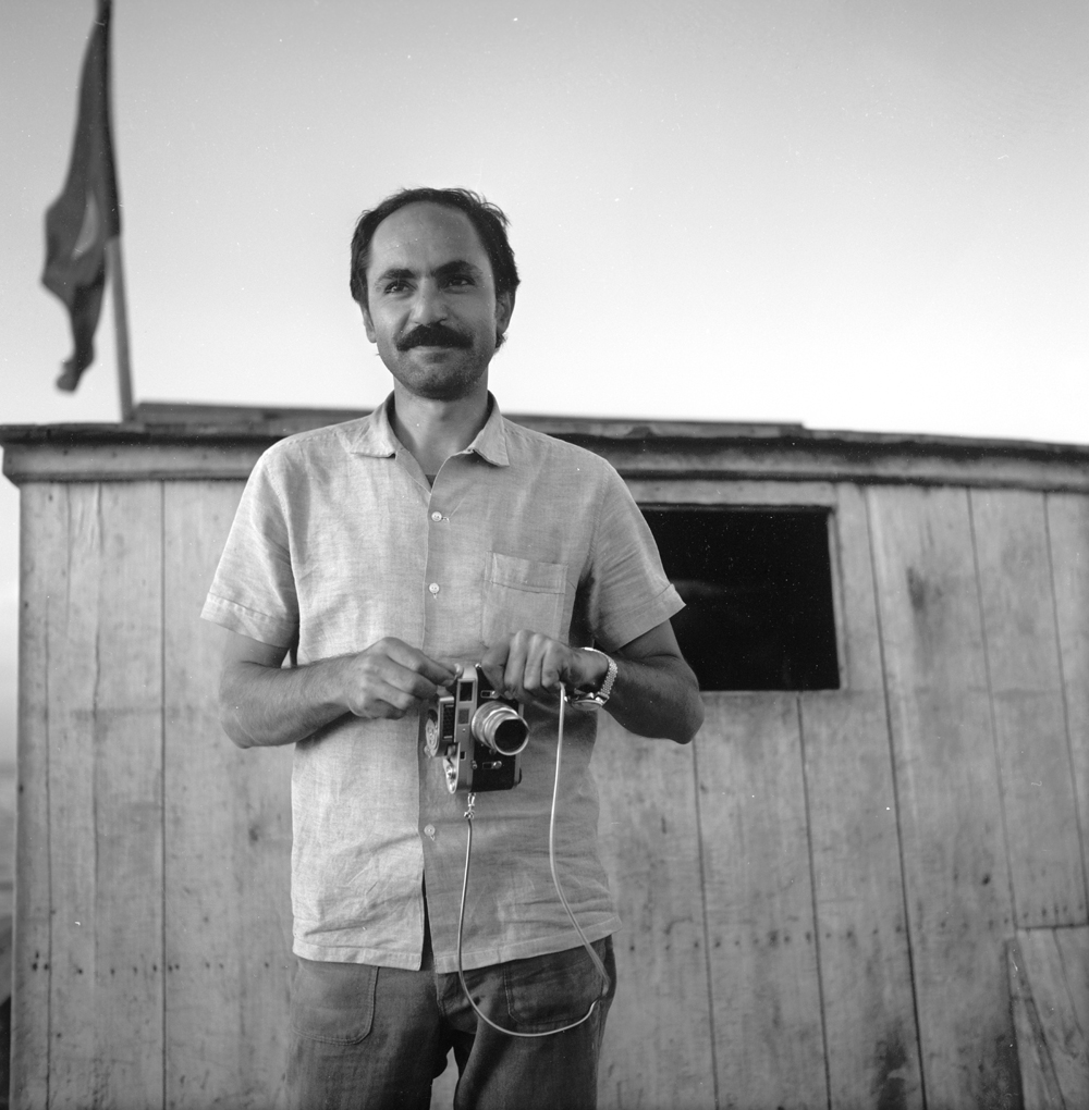 1972 է. Վանա լճում